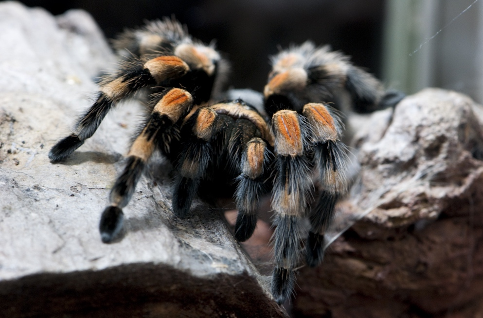 20100411-_DSC5277